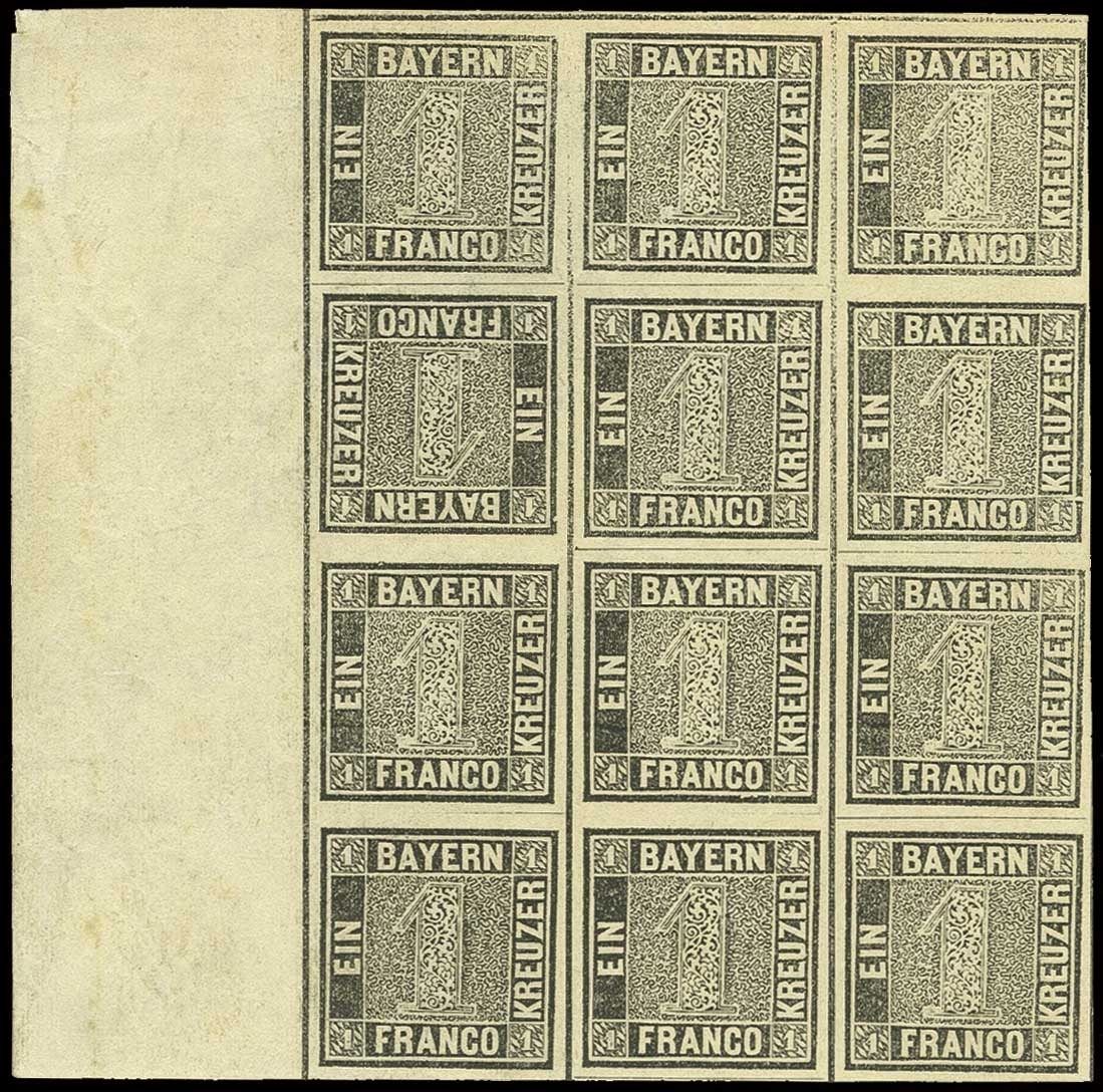 Erste deutsche Briefmarke von 1849, Versteigert für 320.000 Euro